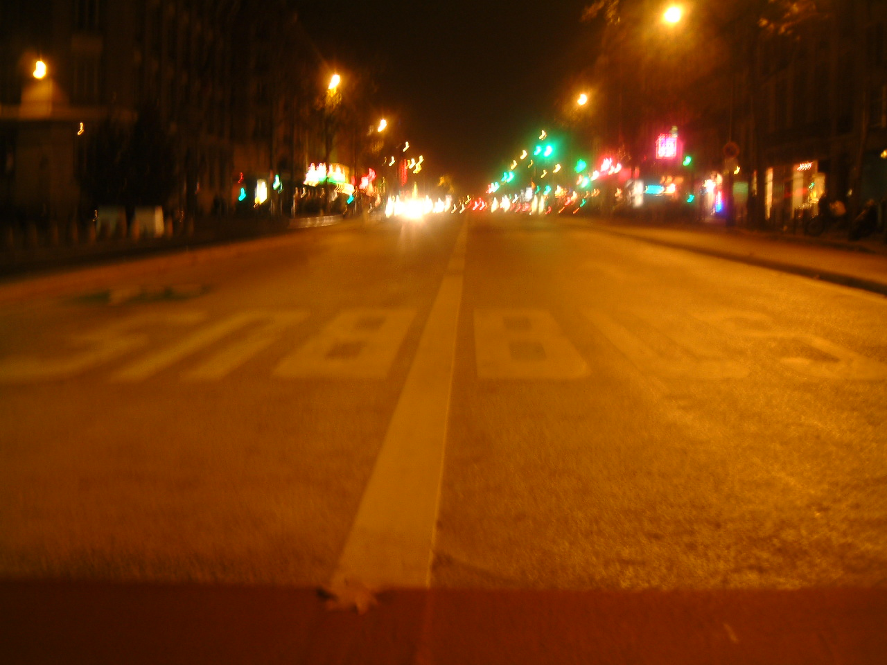 Auteur : NicoNico Description : Le Boulevard du montparnasse